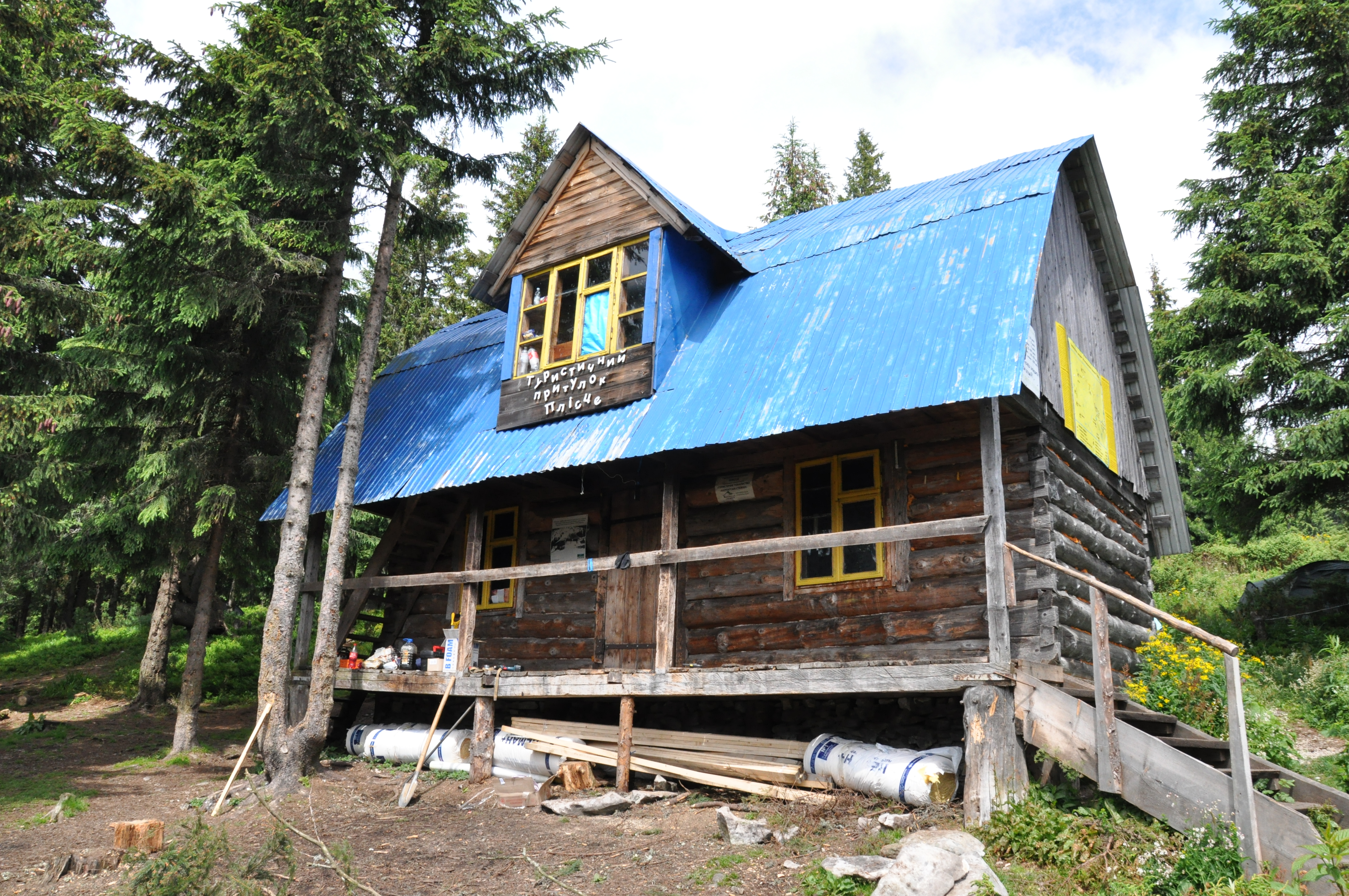 Станом на липень 2017 р.